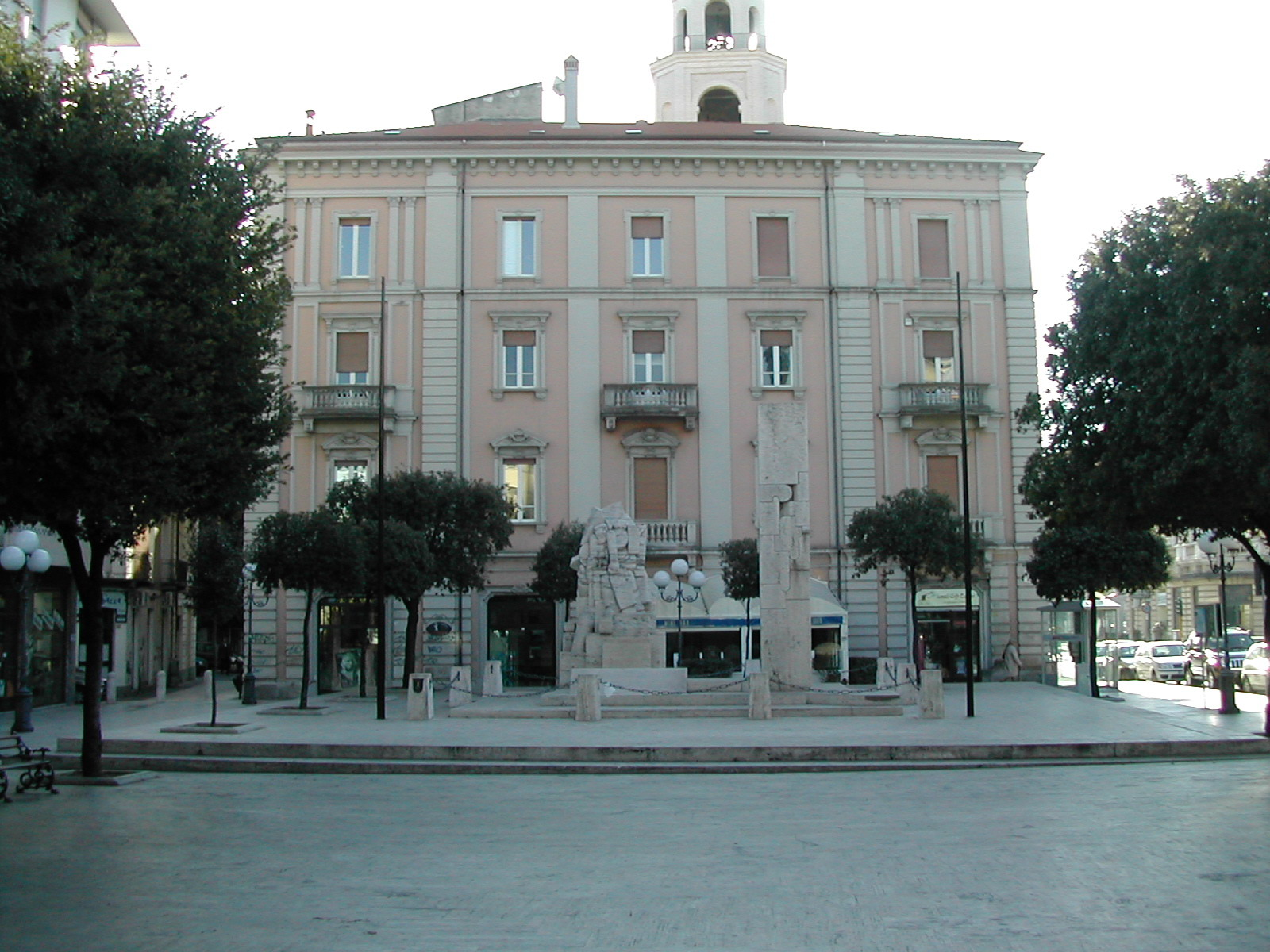 Pescara_Centro storico